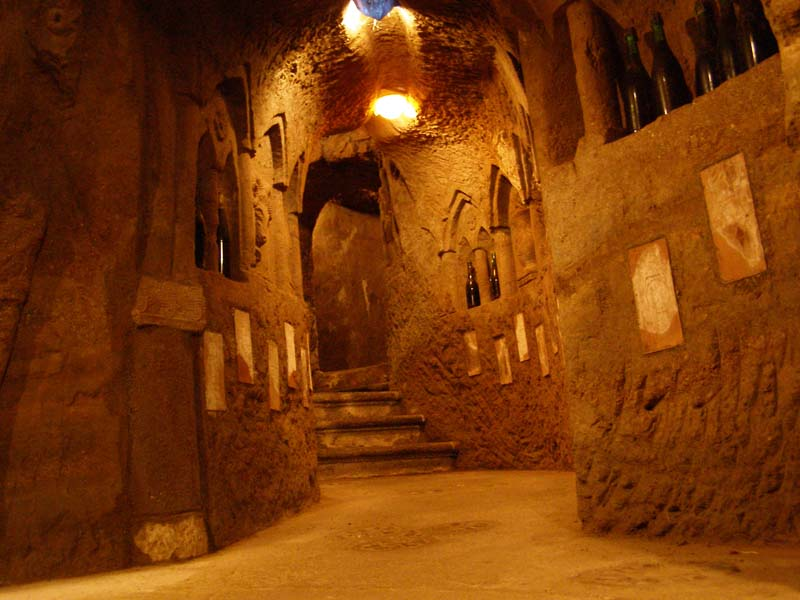 Orvieto Sotterranea - la Galleria Principale